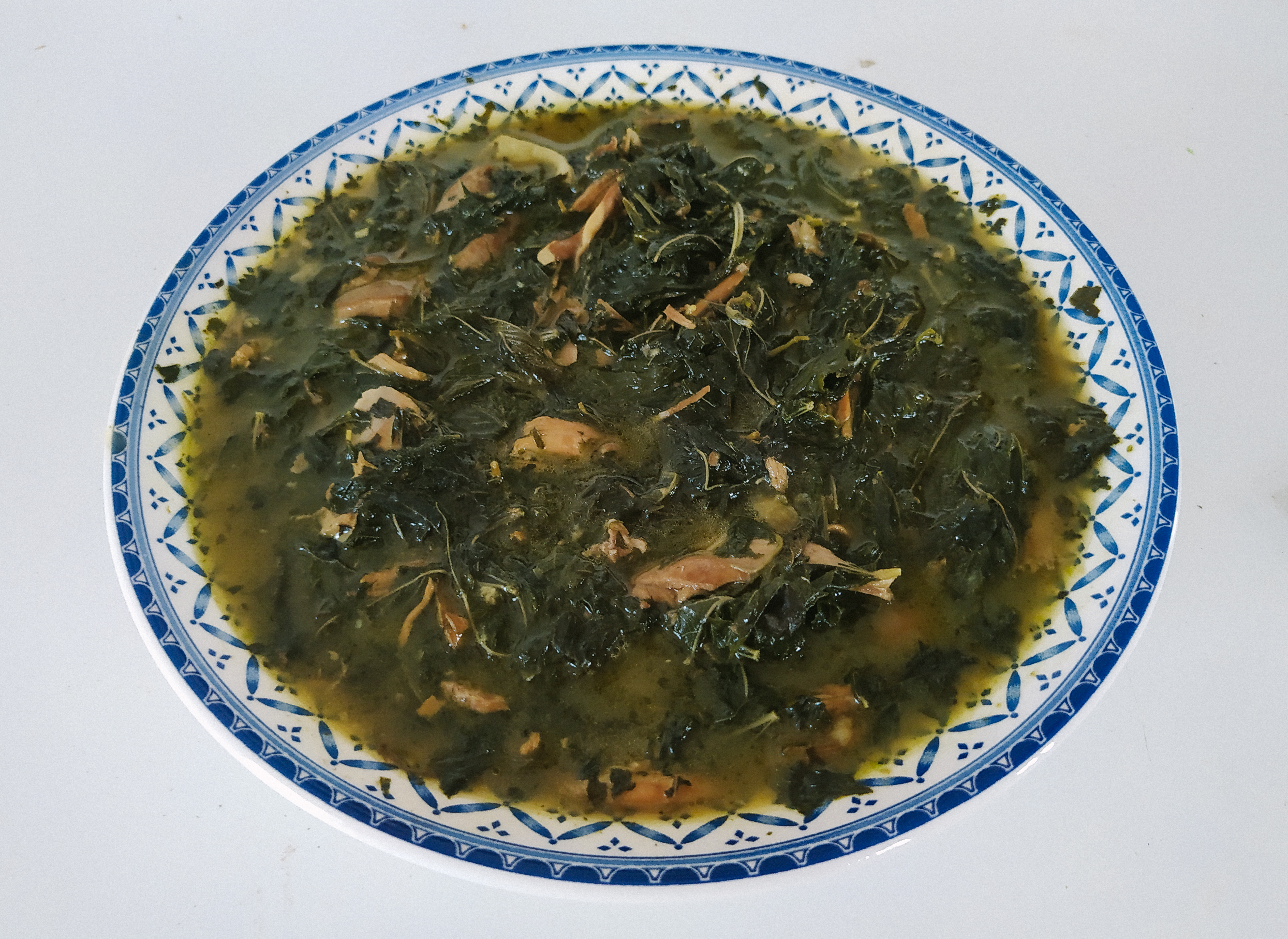 Plato de mlujíe estilo sirio-libanés